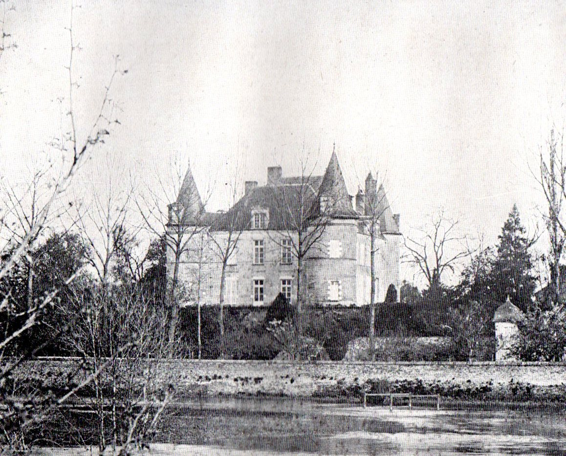 Château de la Ferté-Imbault en Sologne où était employé le missionnaire François Coillard (19{e siècle).